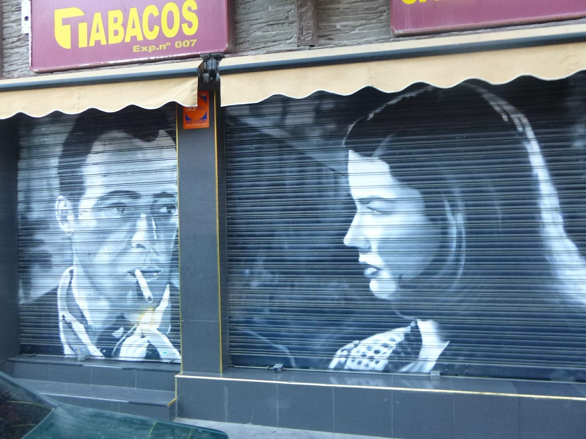 Arganda del Rey (Madrid)